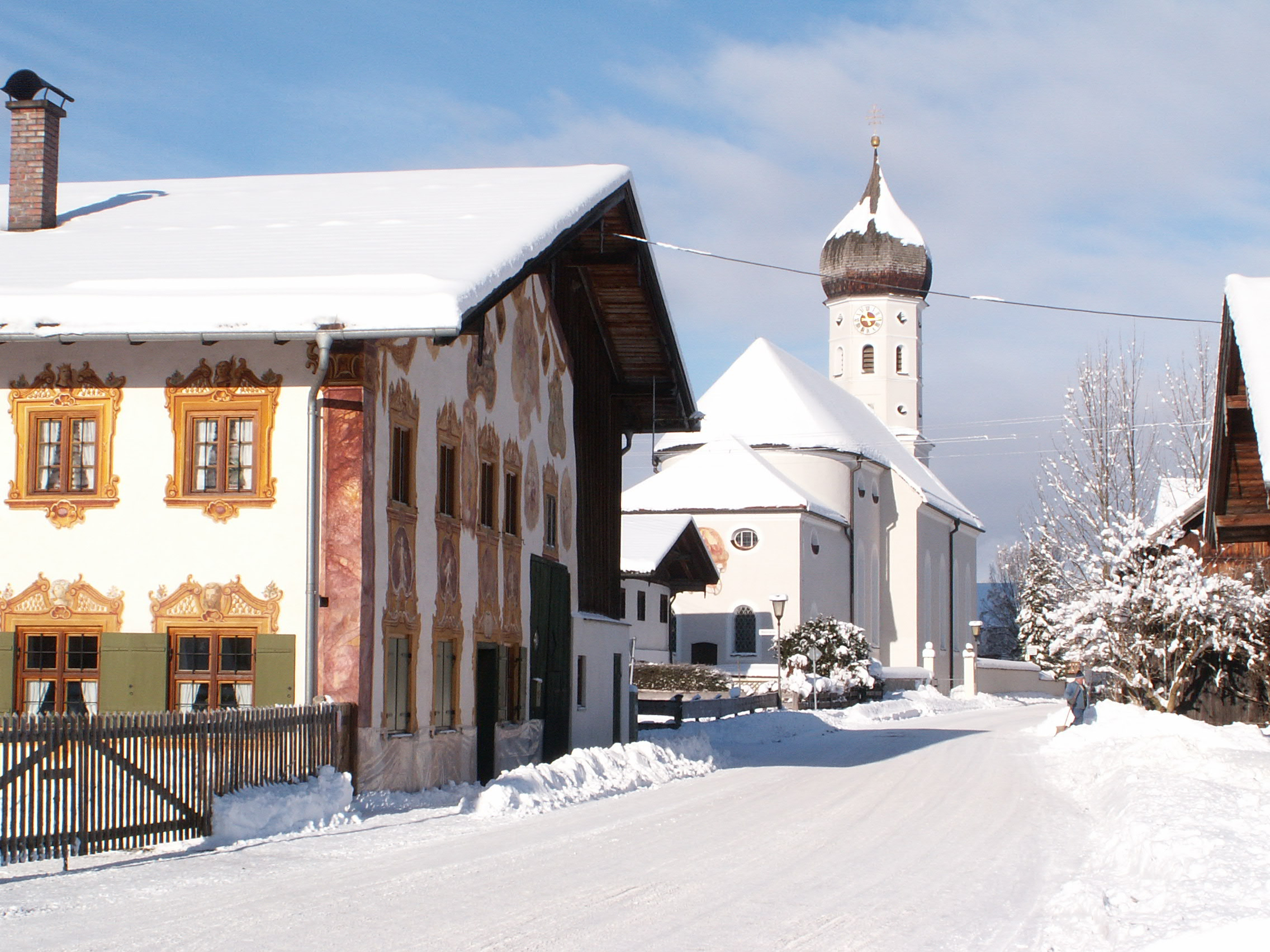 Dorfstr. in Unterammergau